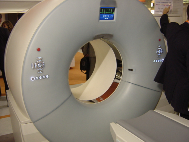 CT-scan à doubles tubes.